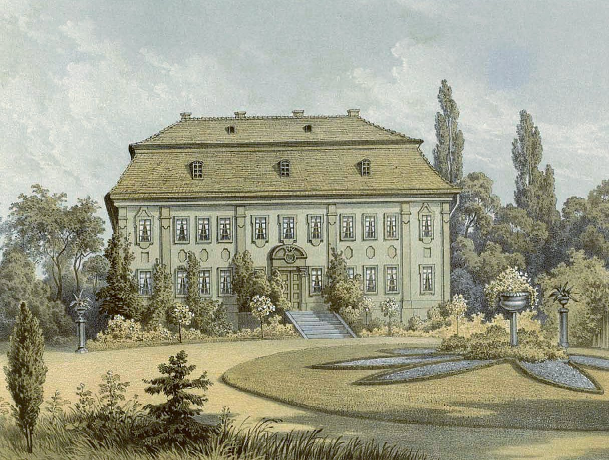 Rittergut Reuden, Kreis Kalau, Provinz Brandenburg